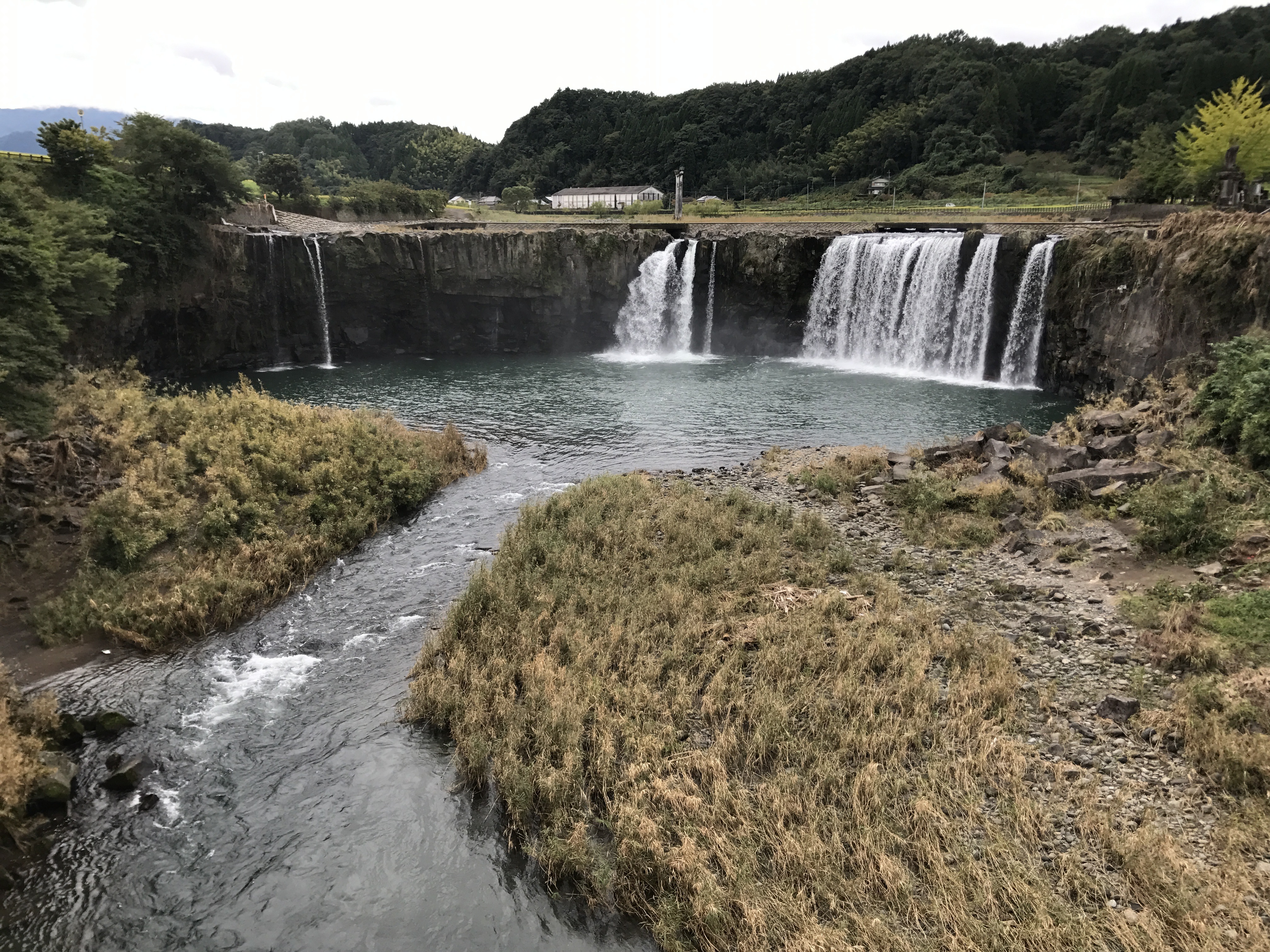 滝見橋より望む原尻の滝